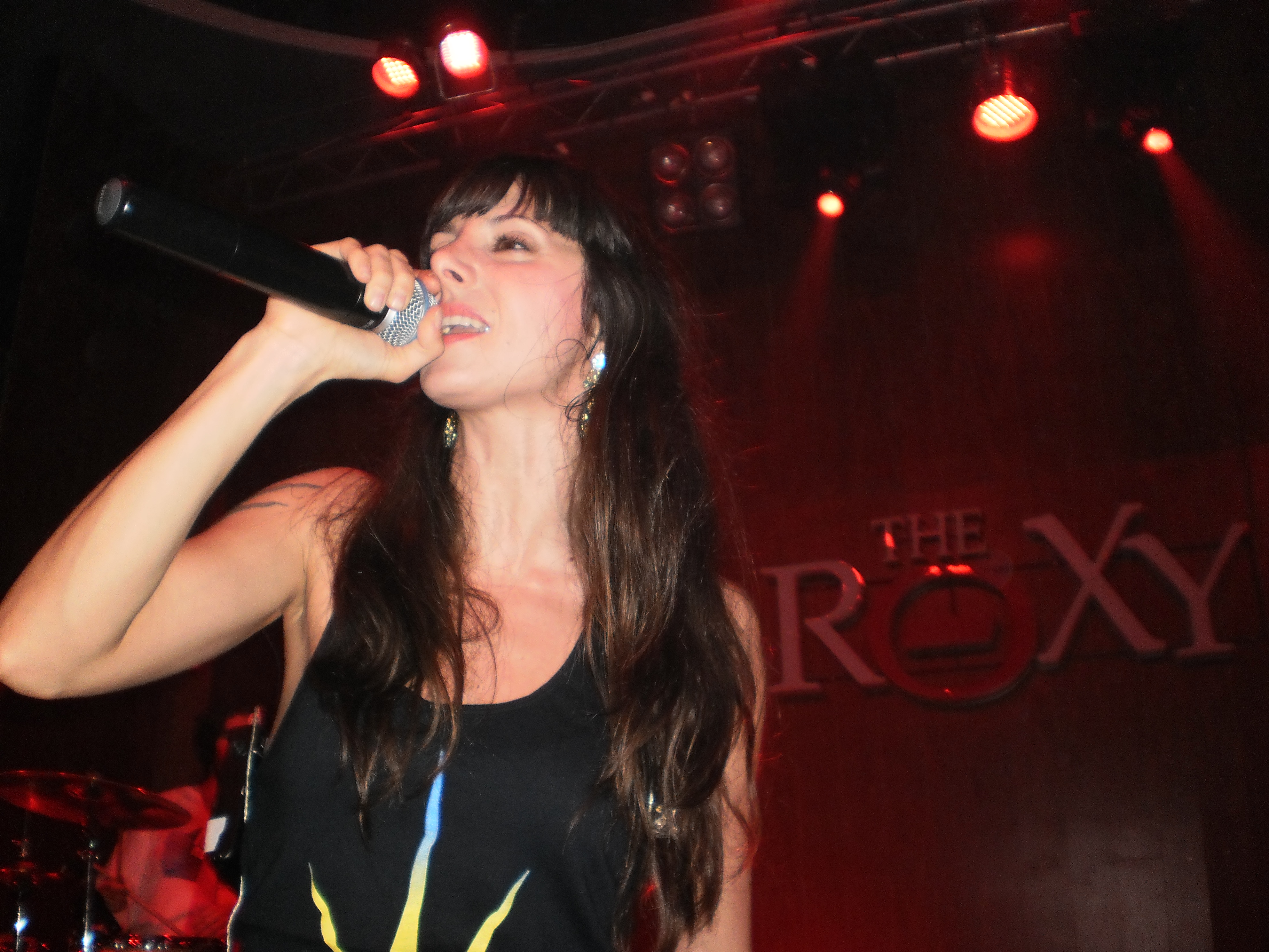 Mala Rodriguez en The Roxy Córdoba Argentina